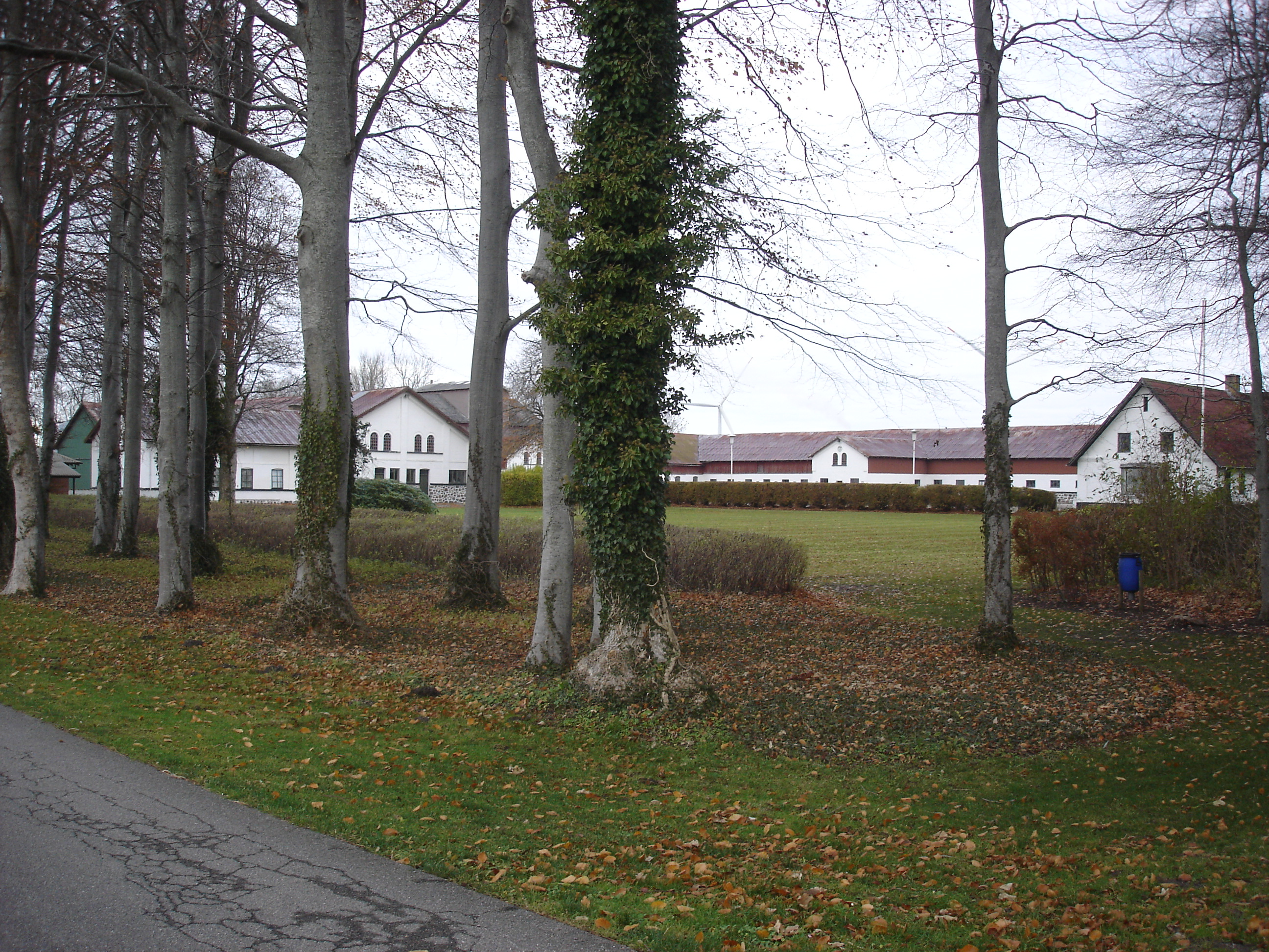 Herregården Stranderholm N for Klarup